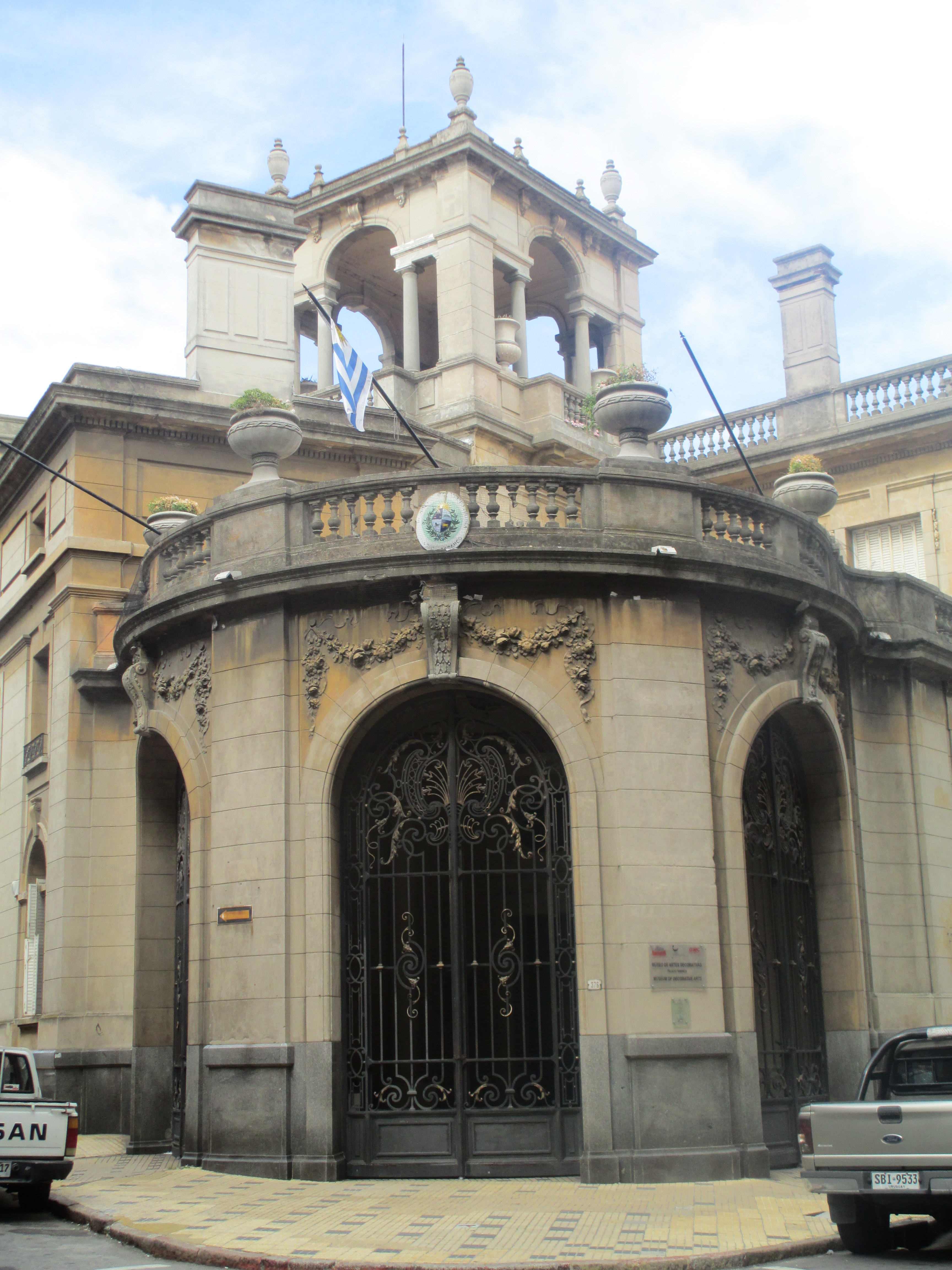 Fachada trasera del Palacio Taranco en la ciudad de Montevideo, Uruguay.